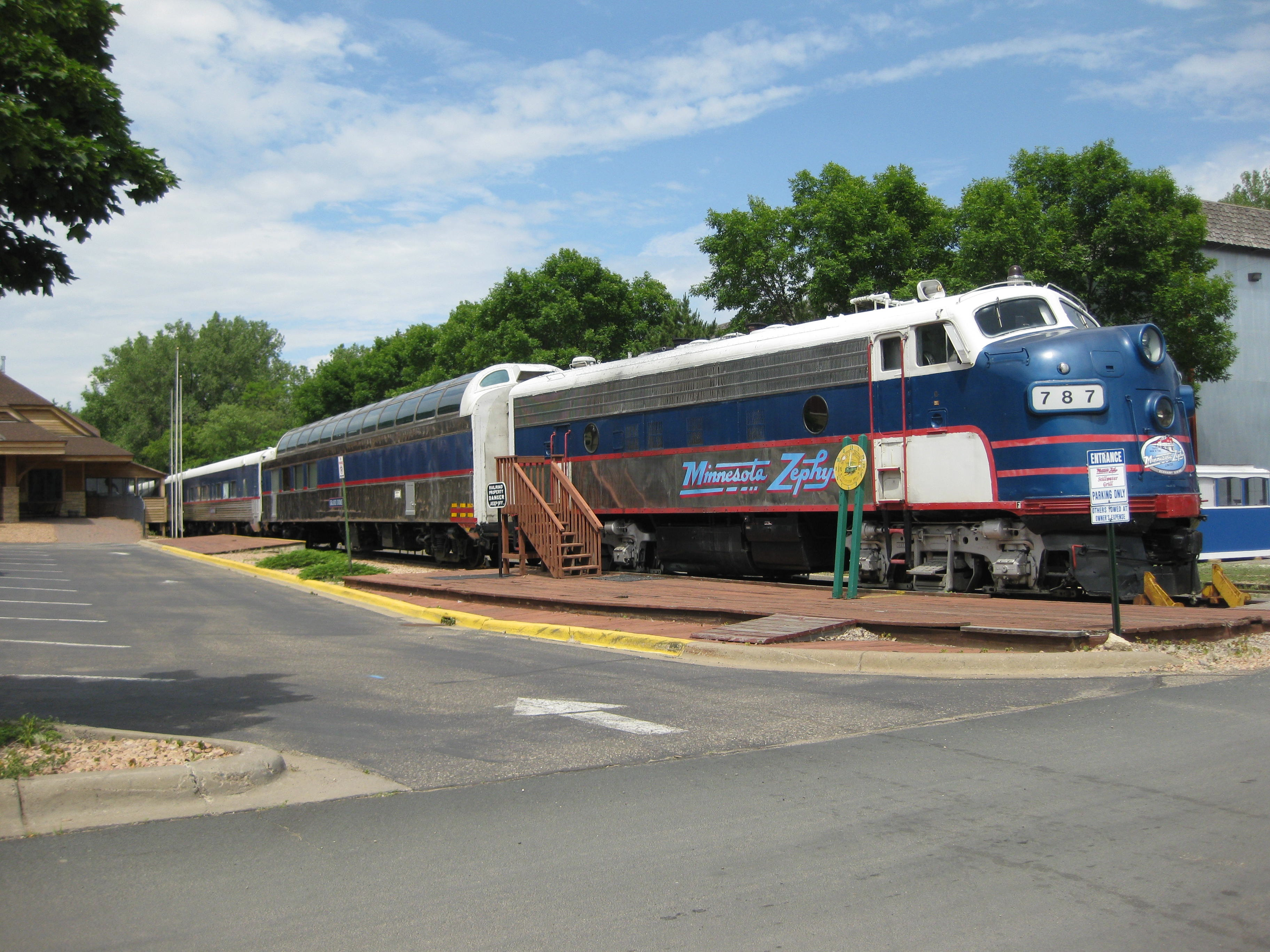 Minnesota Zephyr Train